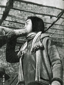 中文（中国大陆）: 清华大学女学生陆璀在北平西直门外进行抗日演讲。《大众生活》第一卷第六期封面。